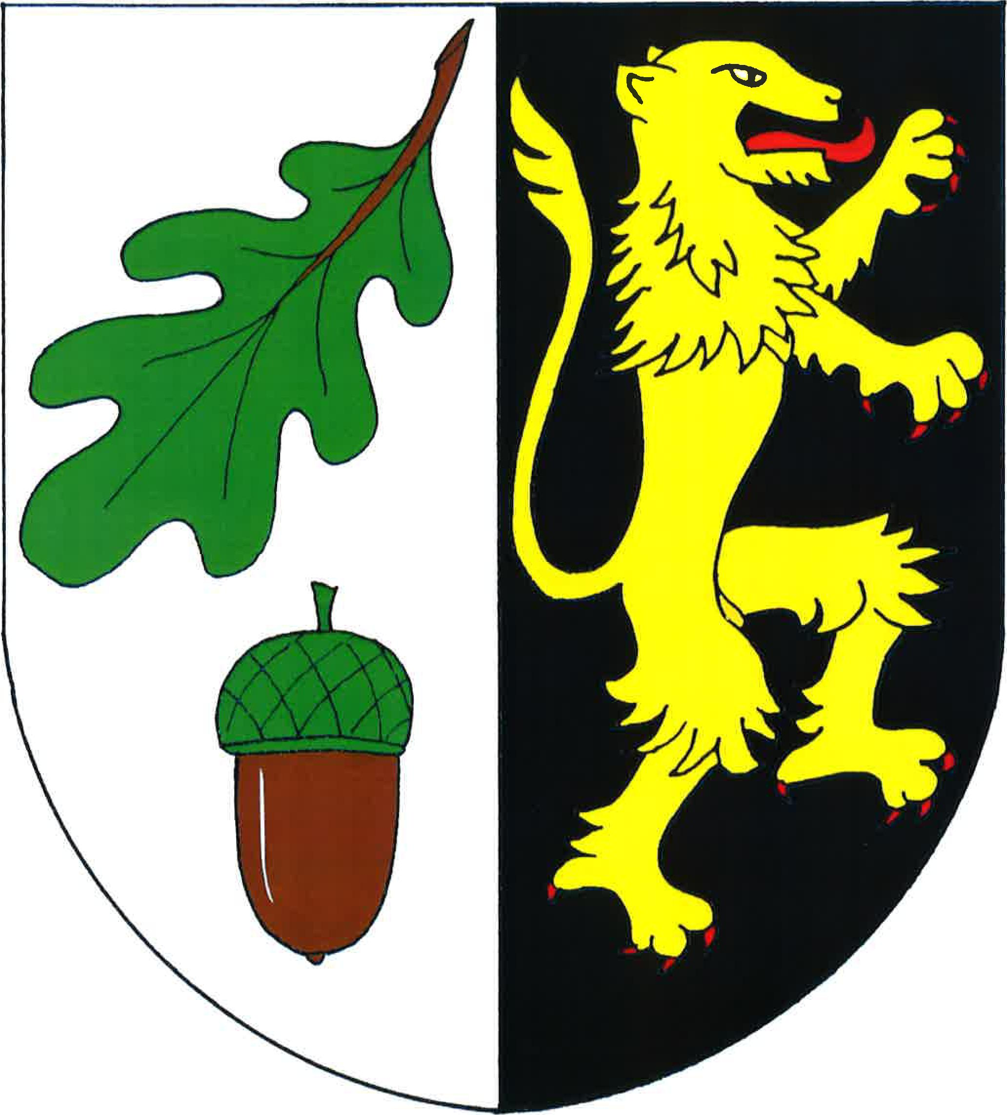 znak, Doubravice, okres České Budějovice